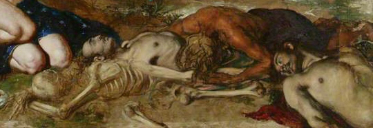 detail